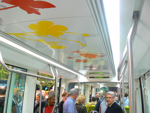 Vue du plafond du tramway d'Angers